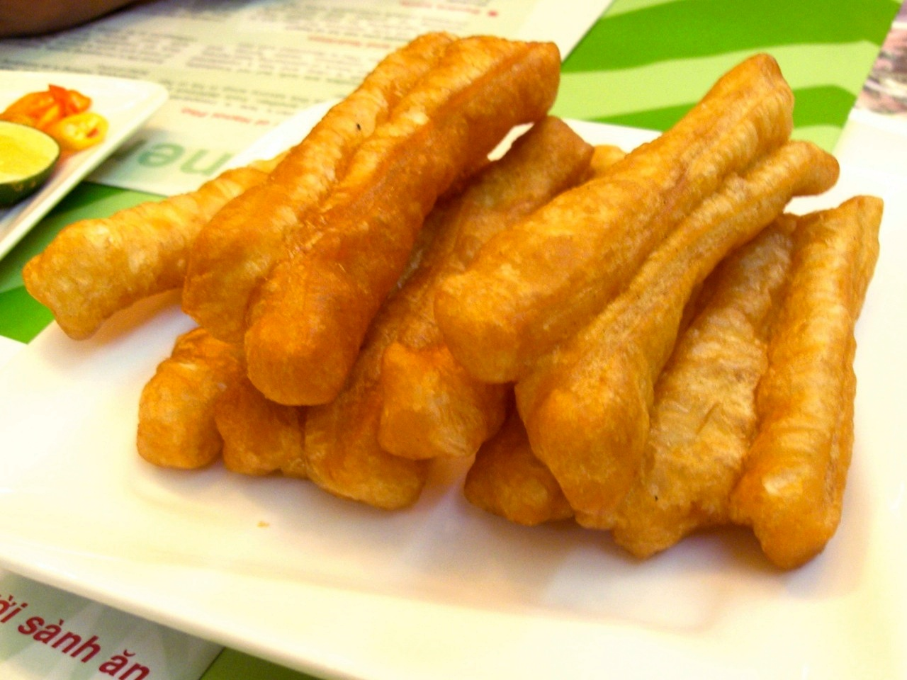 quẩy.